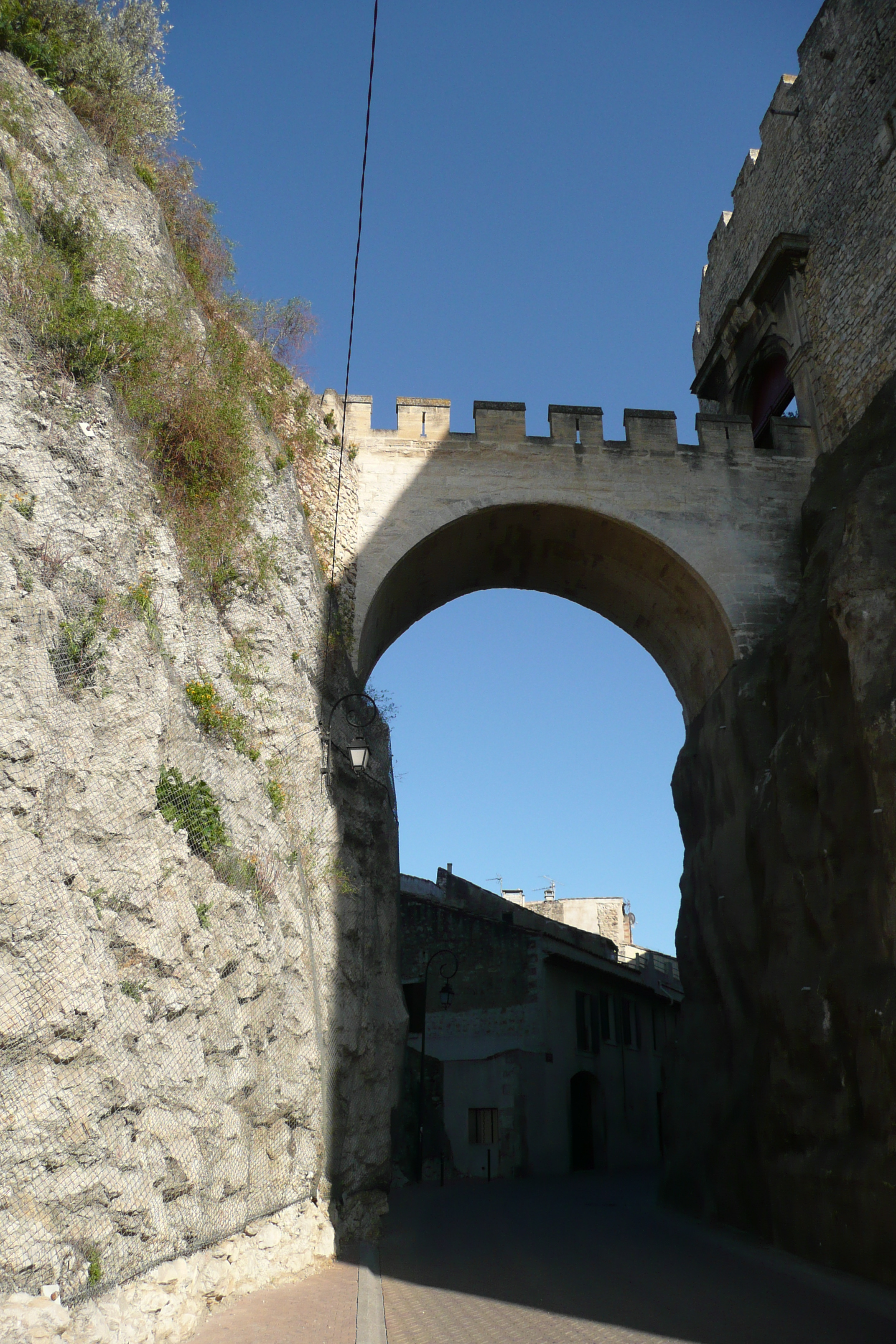 Porte en Aramon.